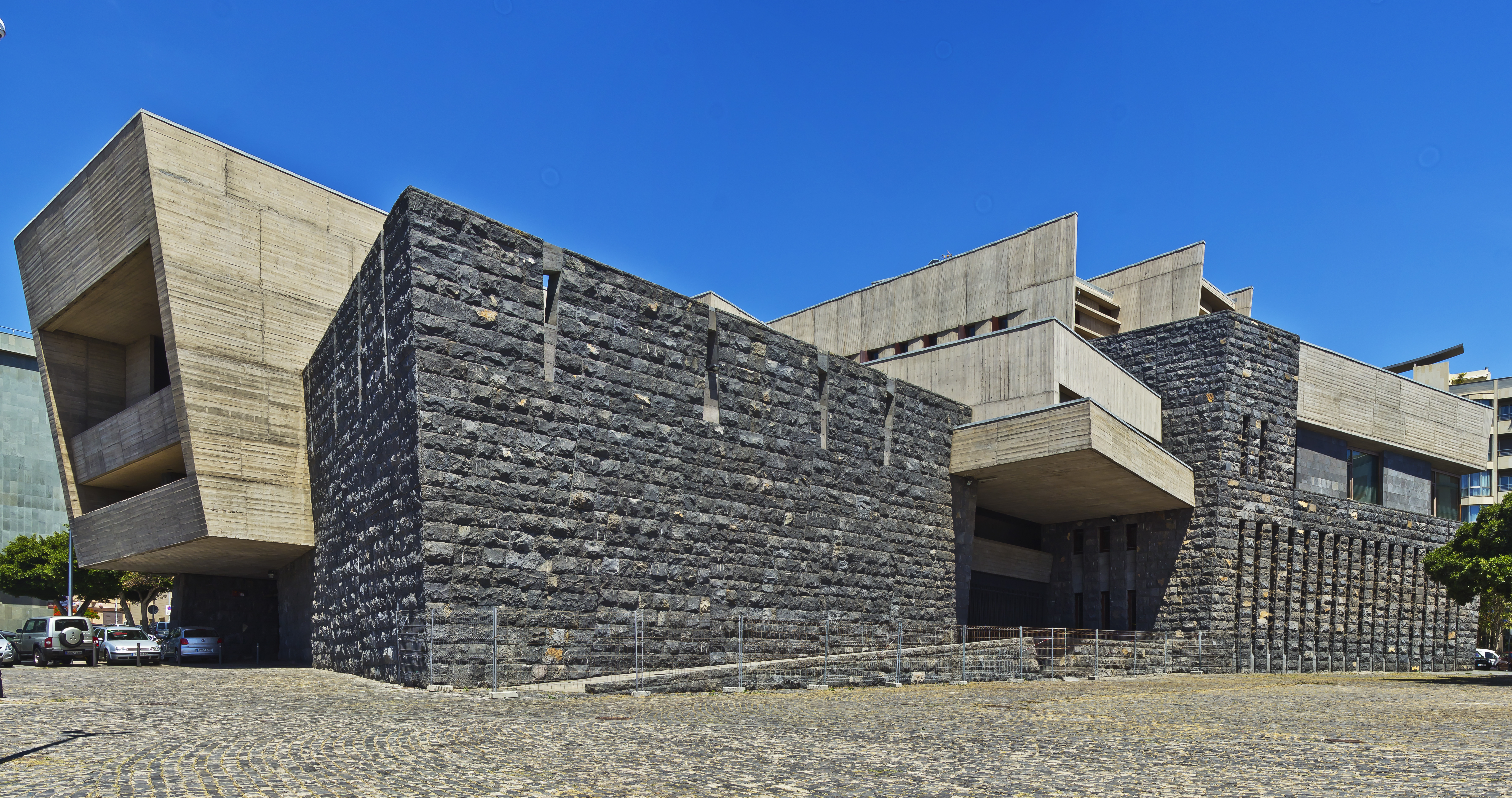 Das Gebäude der Presidencia del Gobierno de Canarias (Sitz des Ministerpräsidenten der Kanarischen Inseln) wurde 1993 nach Plänen der von Teneriffa stammenden Architekten Felipe Artengo Rufino, Fernando Martín Menis und José María Rodríguez-Pastrana gebaut. Es befindet sich in Santa Cruz de Tenerife.